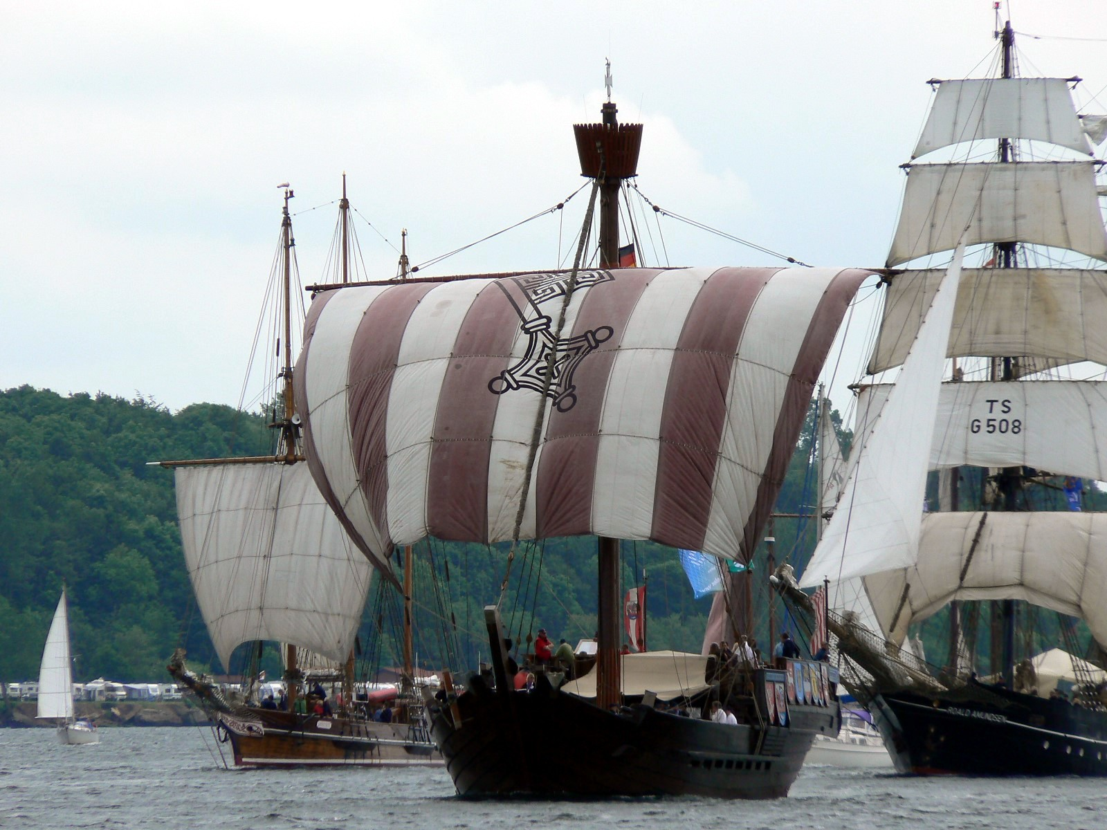 Segelschiff (Kogge) Ubena von Bremen auf der Kieler Woche 2007. Im Hintergrund rechts der Gaffelschoner Amphitrite (mit gesetzter Breitfock), recht die Brigg Roald Amundsen. Die Kogge ist ein Nachbau der 1962 gefundenen Bremer Hansekogge. Bauzeit: 1988-91.